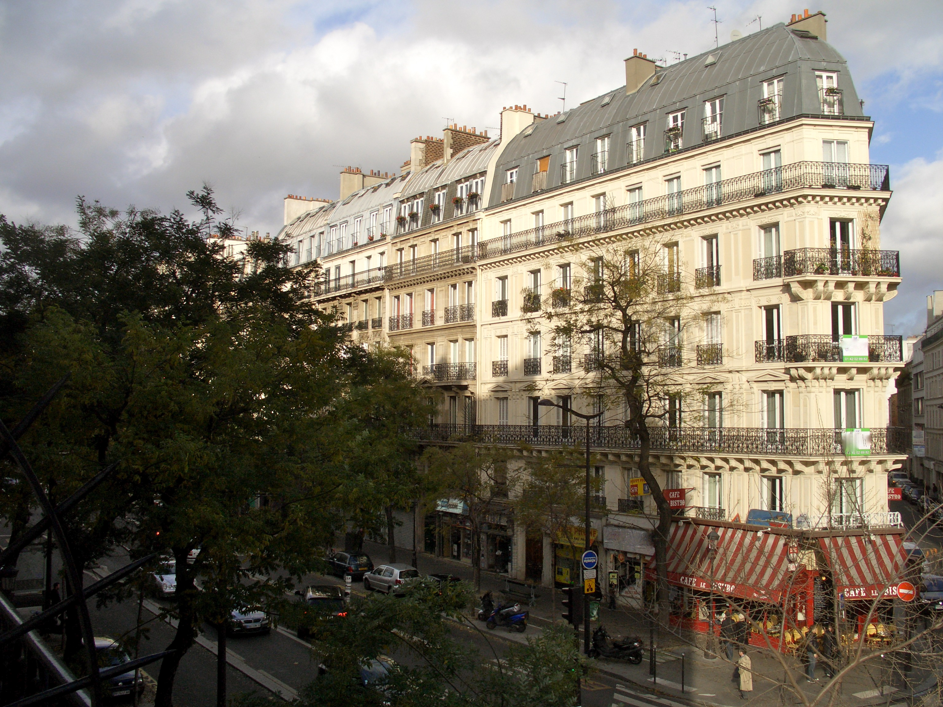 Immeuble haussmannien du Boulevard de Magenta